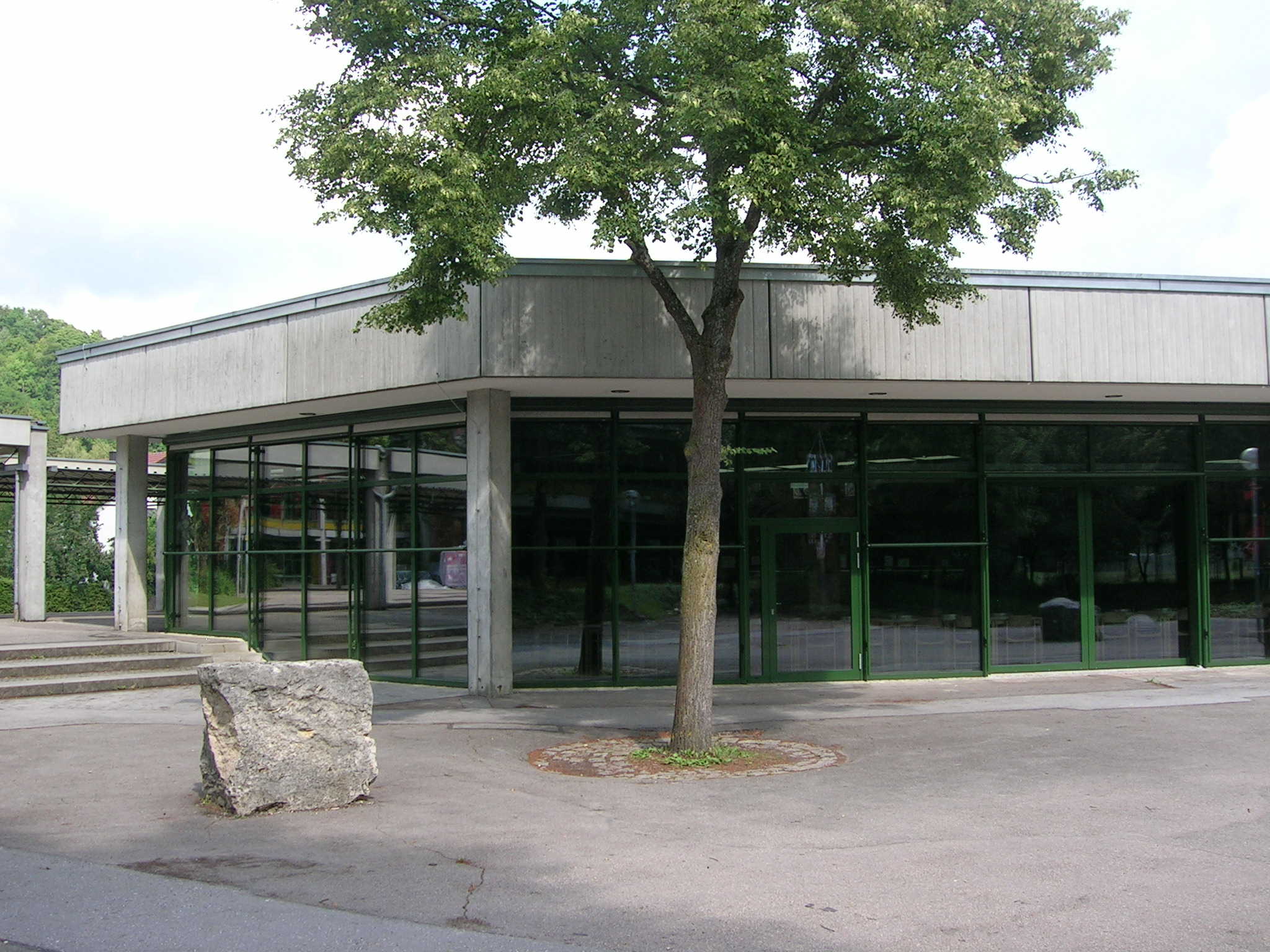 Schulzentrum Eichstätt-Schottenau: Mittelschule und Willibald-Gymnasium.